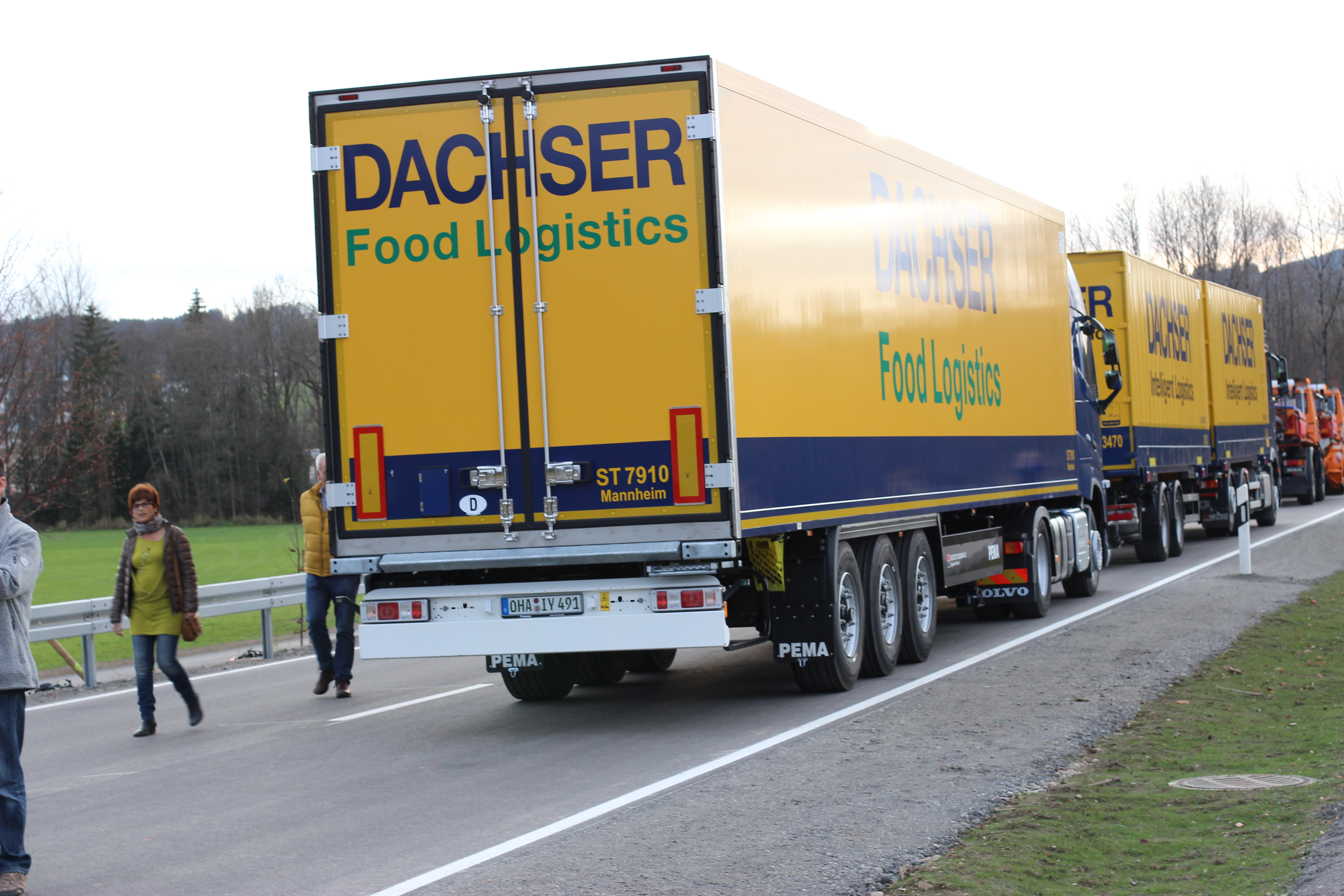 Am 6. November 2015 wurde die Nordspange in Kempten eröffnet.